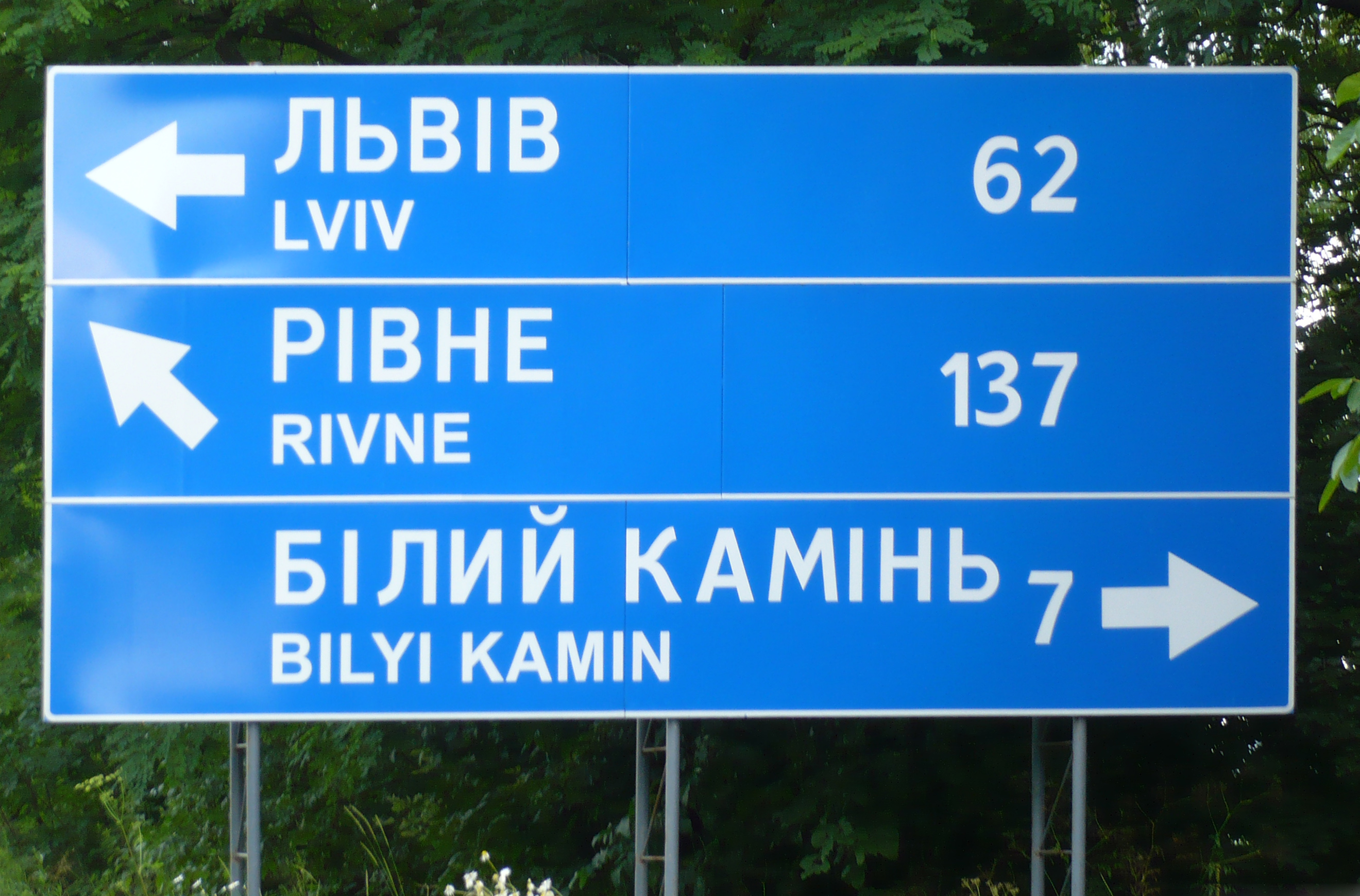 Biały Kamień na Ukrainie - tablica drogowa